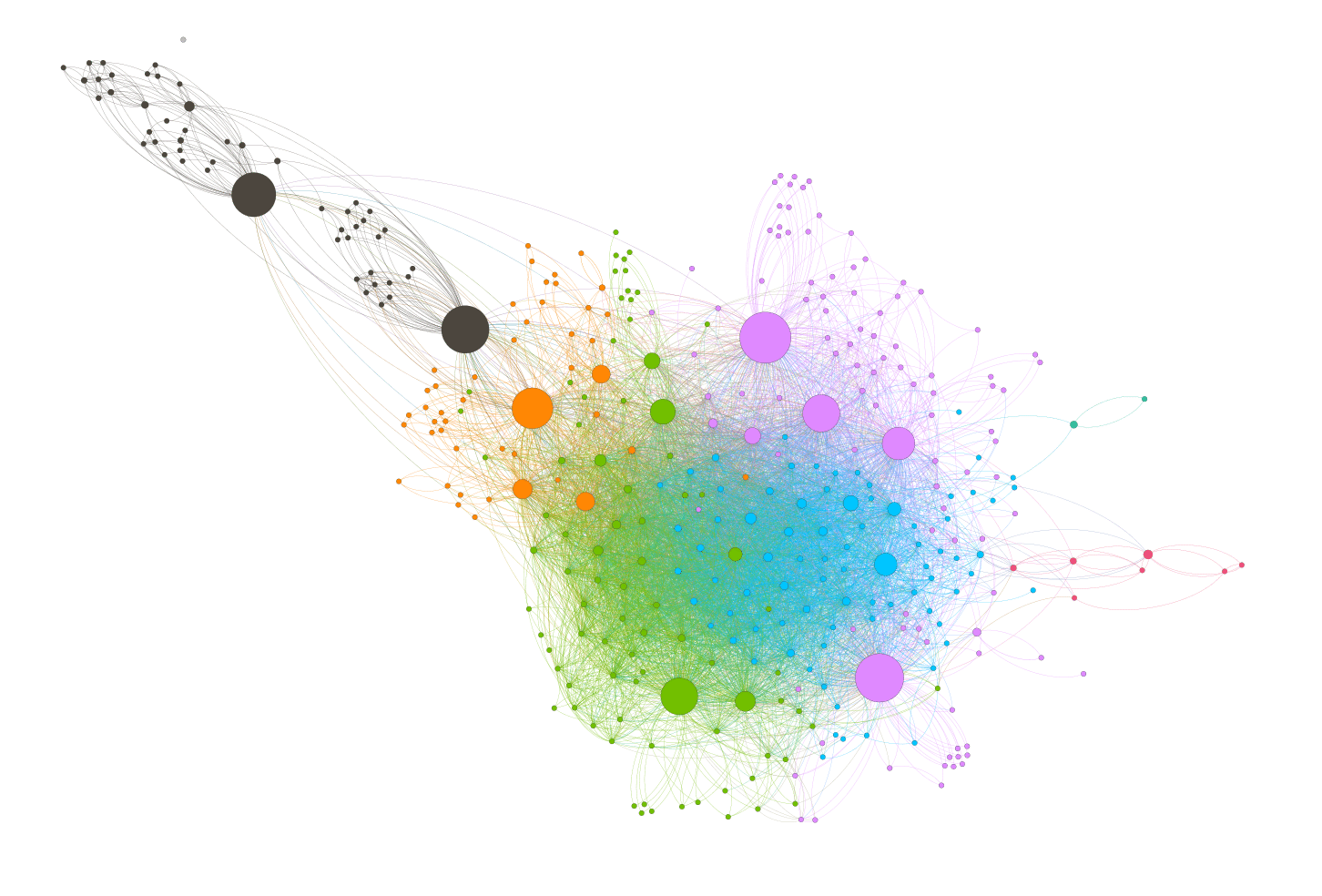 Esta é uma representação de uma rede/grafo de teoria dos grafos.